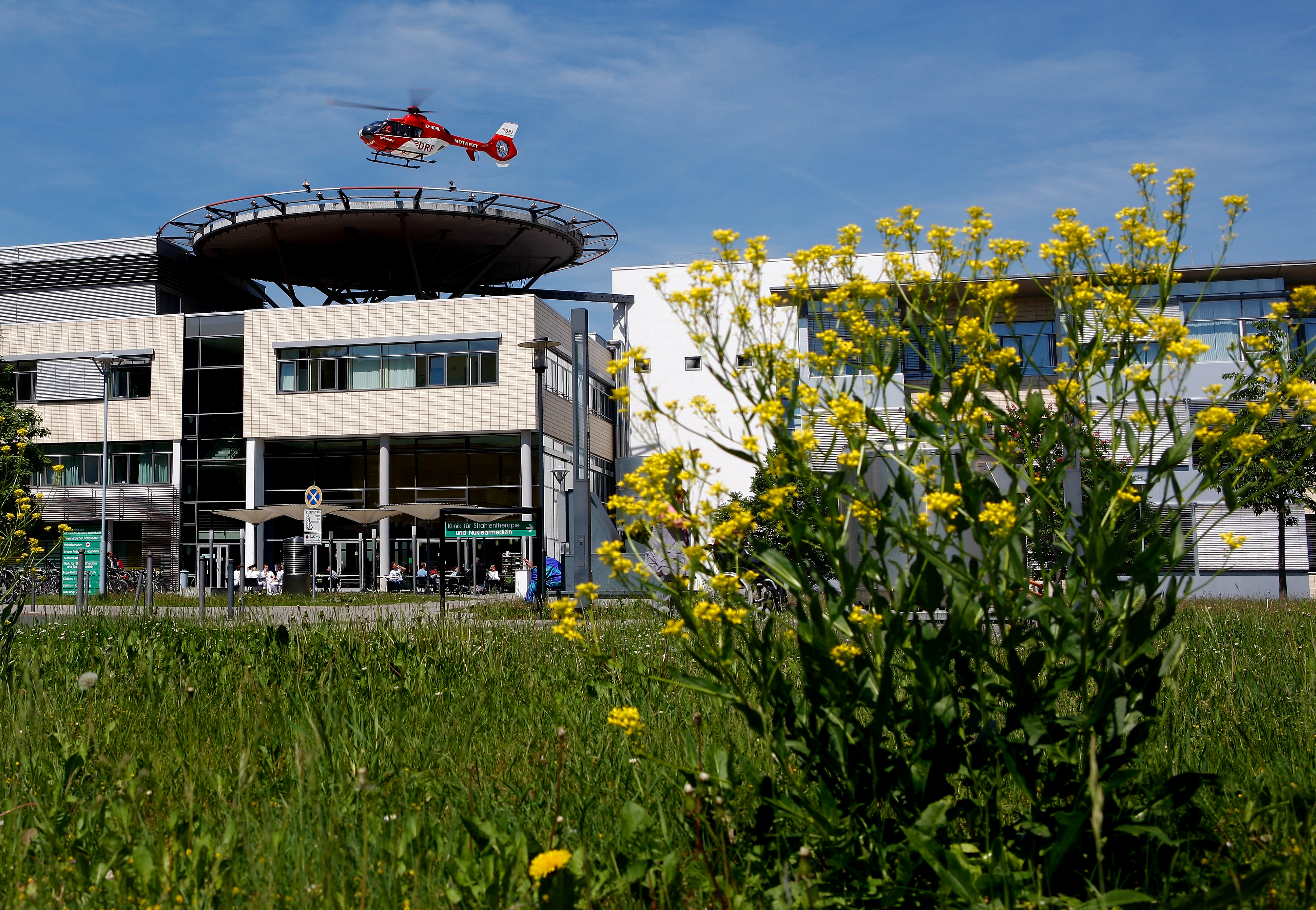 HELIOS Klinikum Erfurt Aussenansicht mit einem Helikopter der DRF mit der Registrierung D-HDRU.